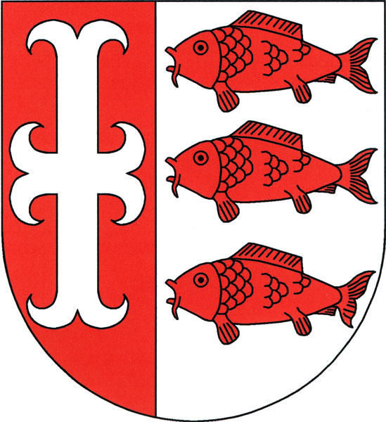 Znak obce Olovnice (okres Mělník)